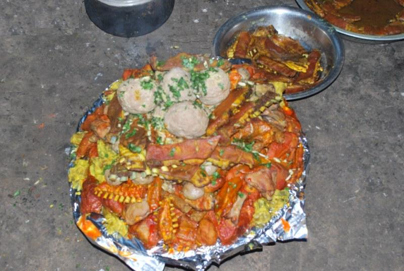 Wazwan Majma (Platter)